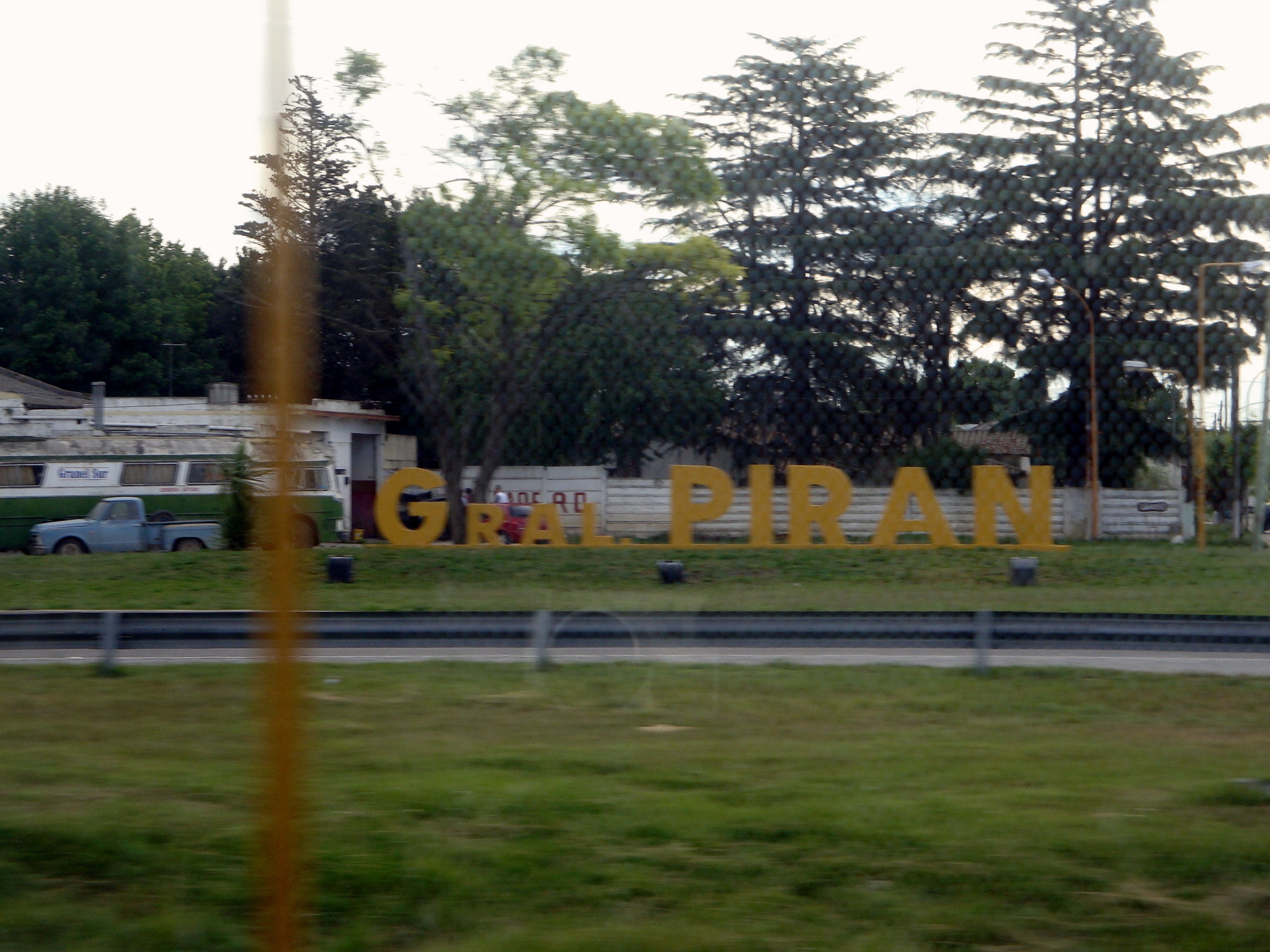 Entrada a General Pirán, Provincia de Buenos Aires.